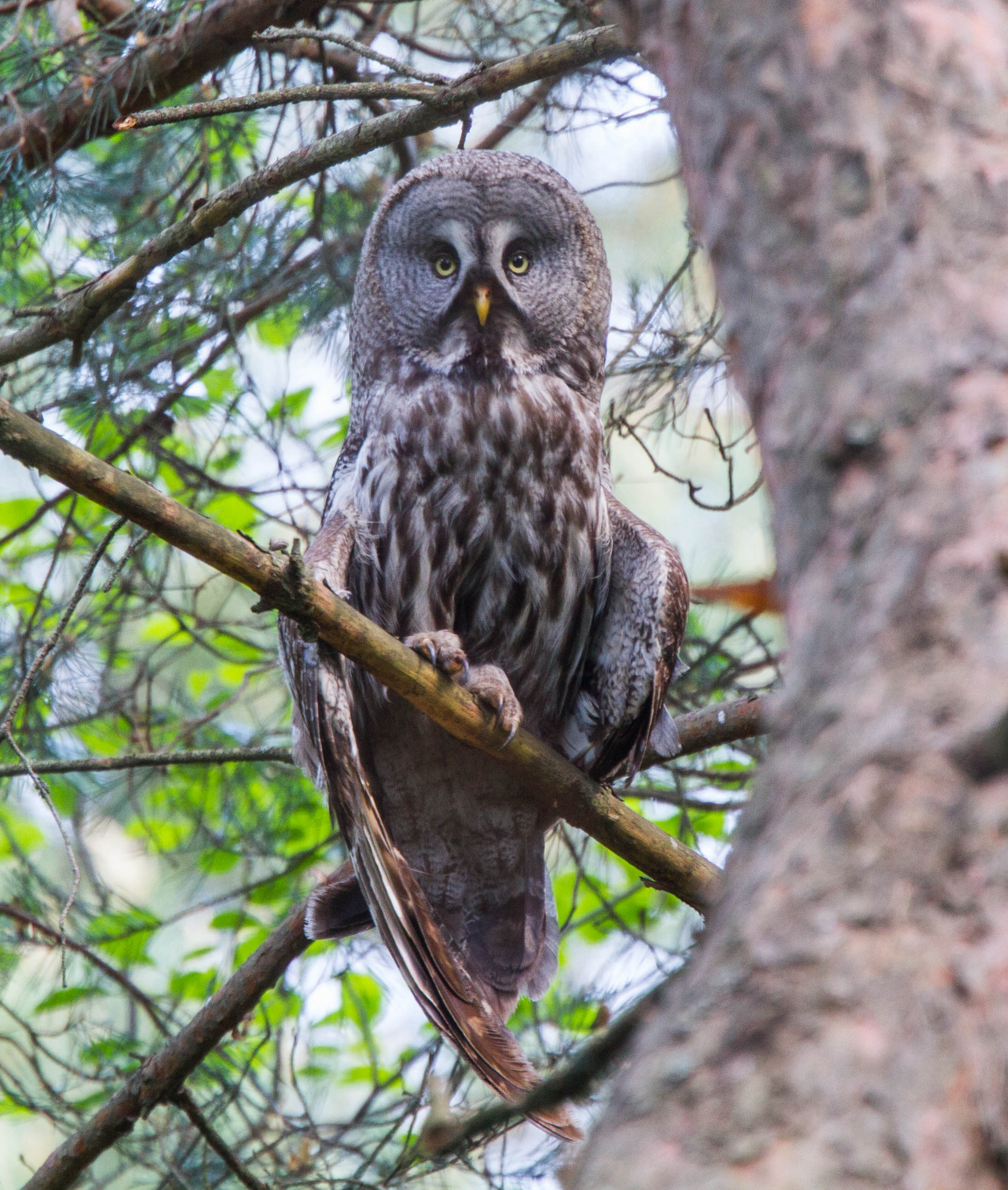 Great Grey Owl Strix nebulosa, Belarus